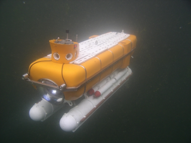 Modell des U-Bootes Mermaid III